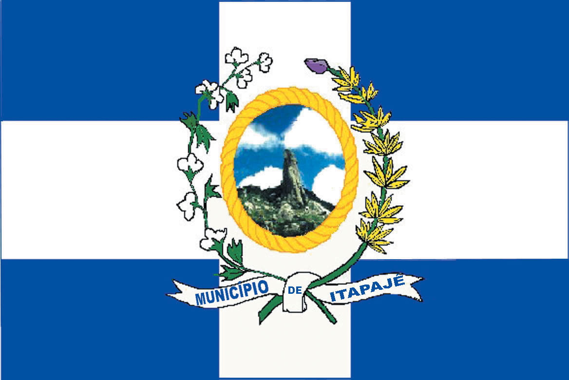 Bandeira do município de Itapajé - CE - Brasil, Ribamar Ramos